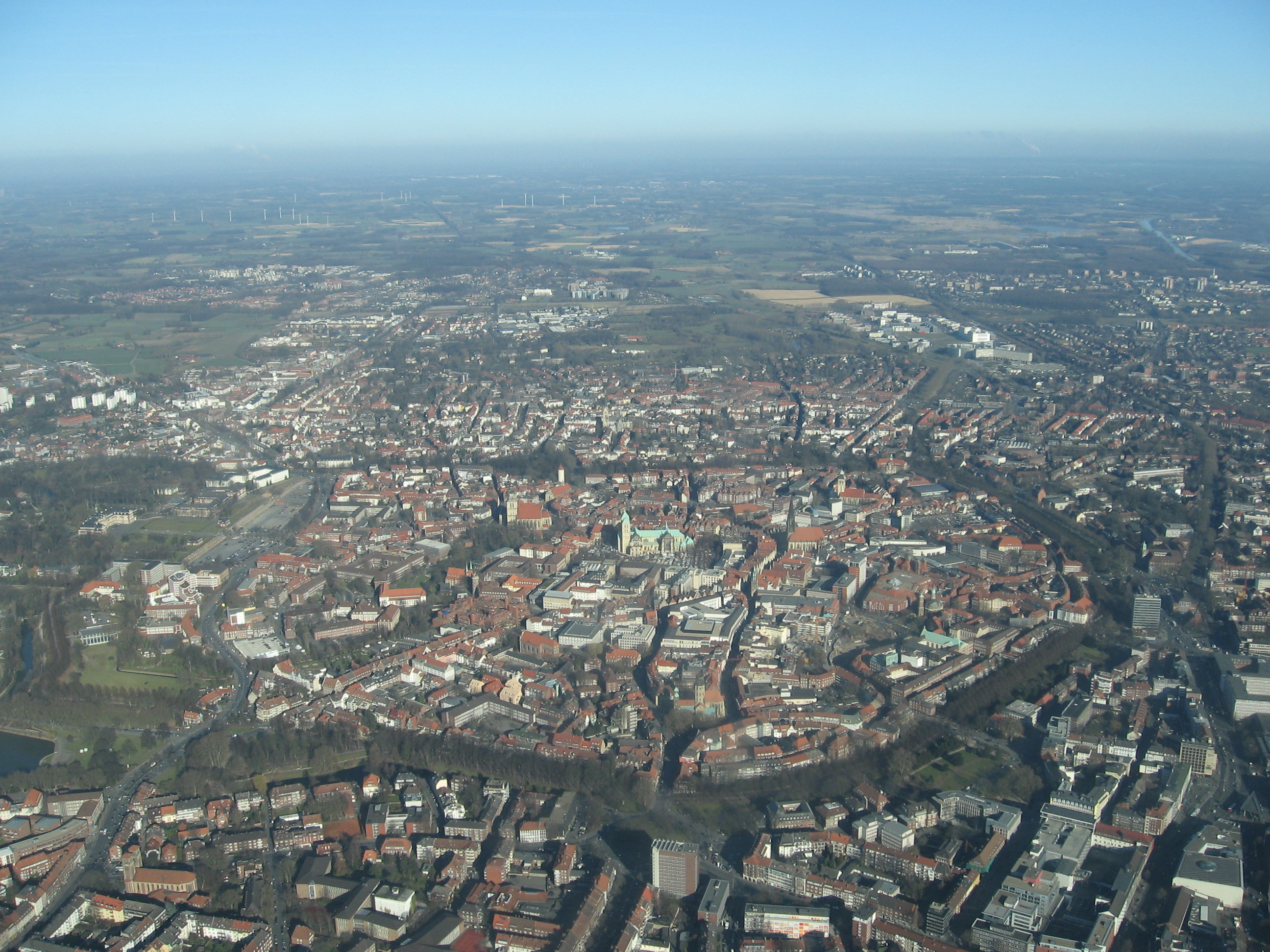 Innenstadt von Münster